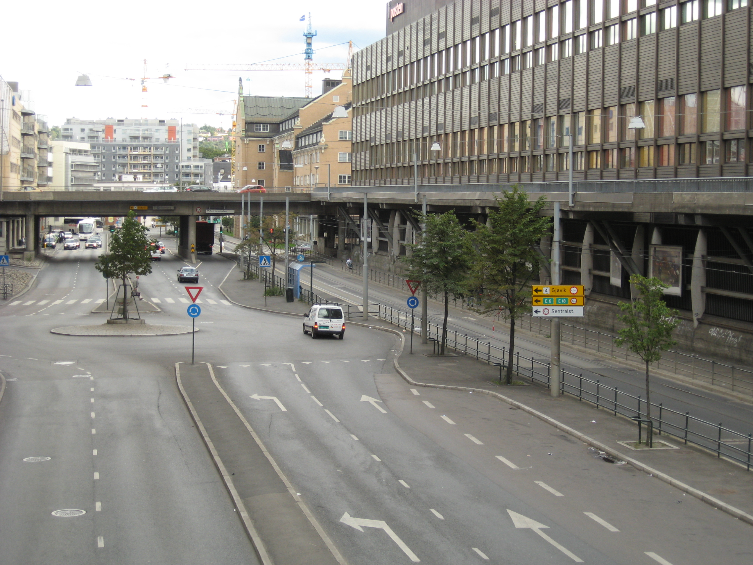 Schweigaards gate ved Vaterland i Oslo. Denne delen av veien er Ring 1 (Riksvei 162). Broen bortenfor er Nylandsveien. Man ser fra vest mot øst, hvorav bygget til høyre er Postterminalen